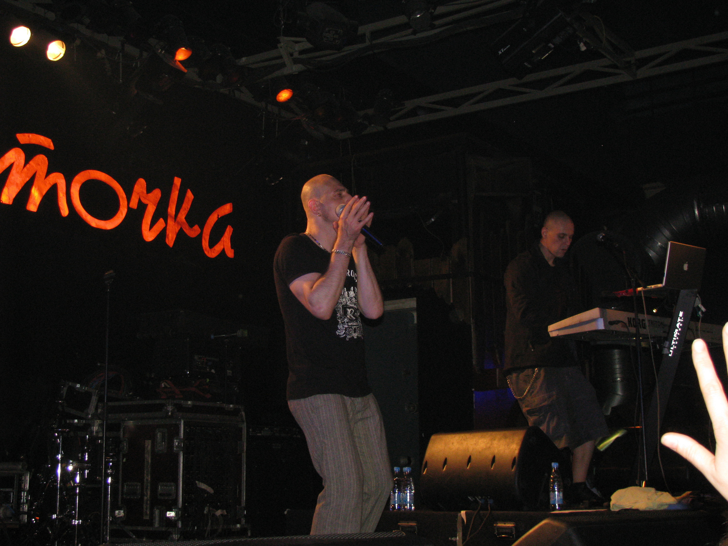 фото участников группы De/Vision